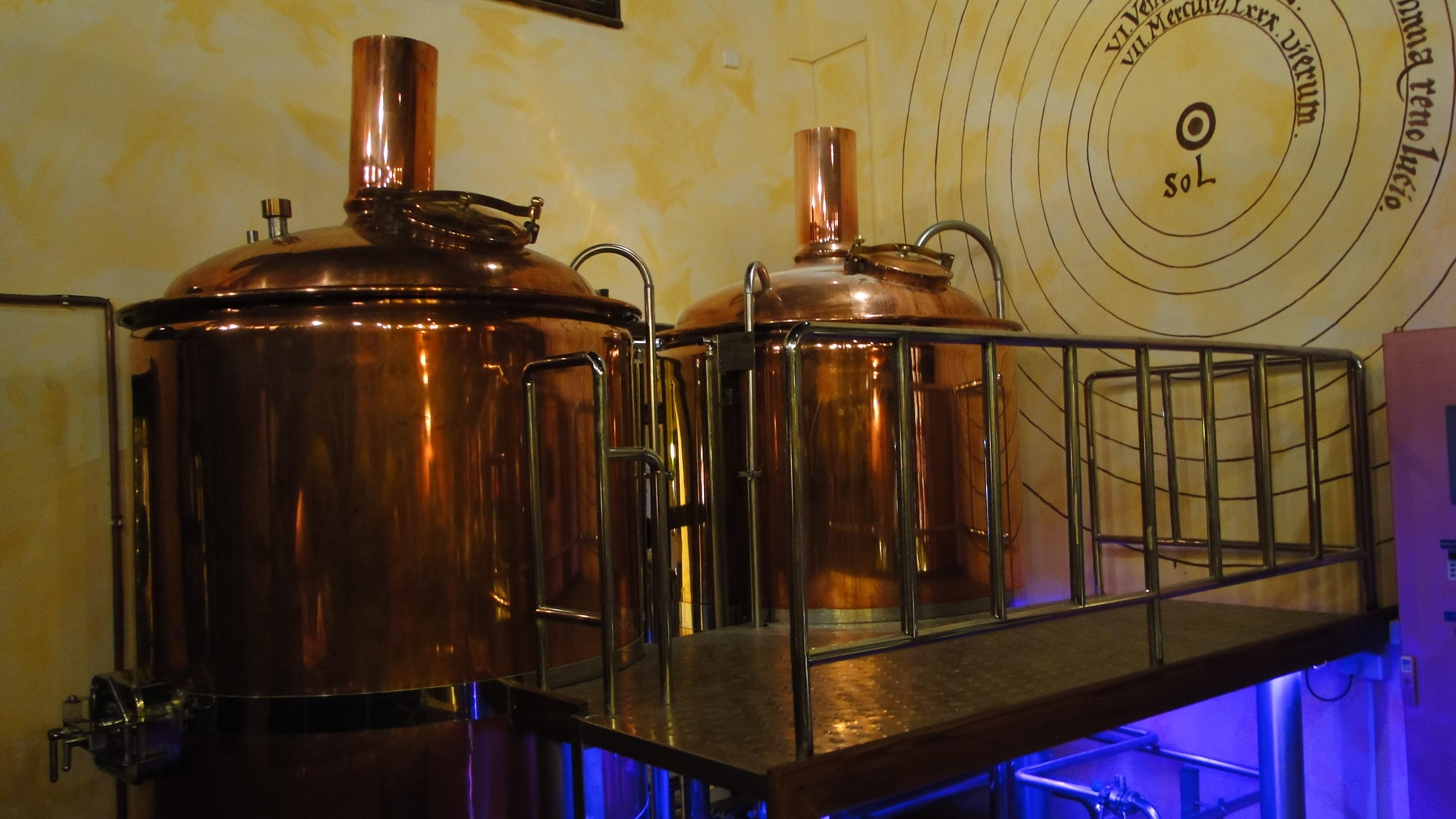 Współczesne kotły warzelniane w lokalnym browarze w Toruniu